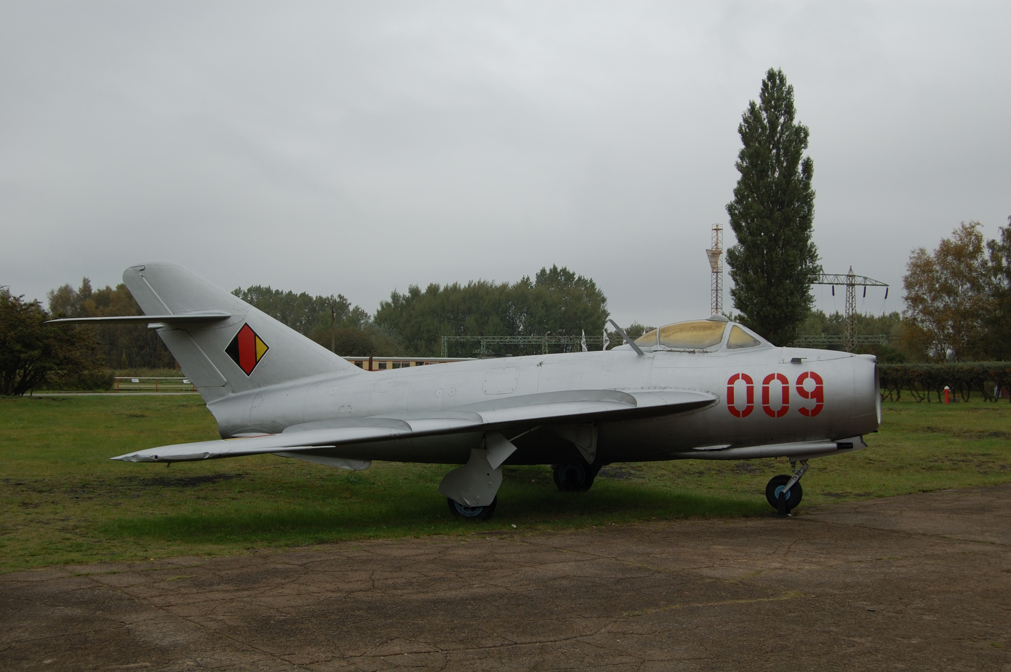 MiG 17 "Fresco" der NVA in Peenemünde